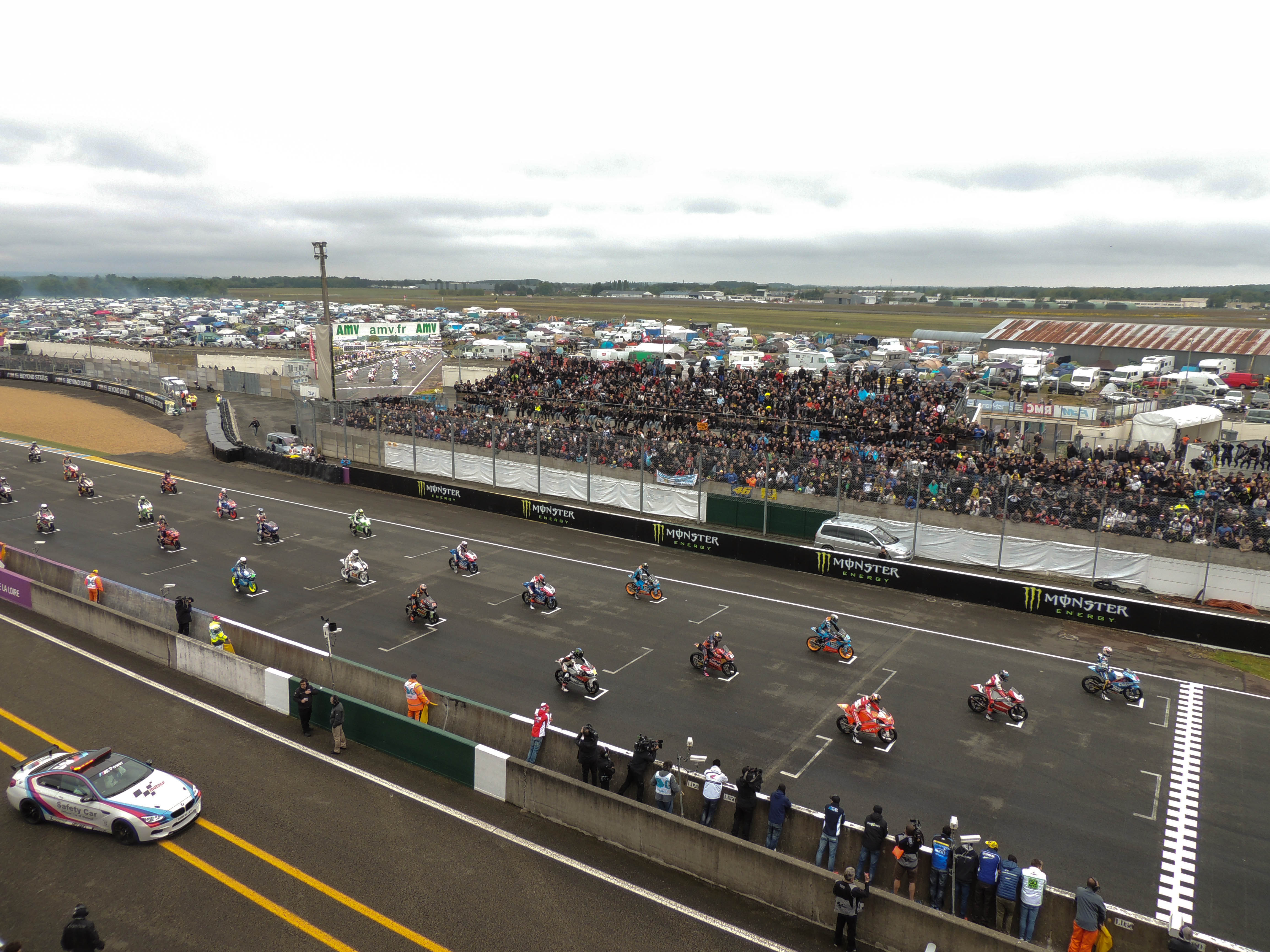 La grille de départ dans la catégorie Moto 3.